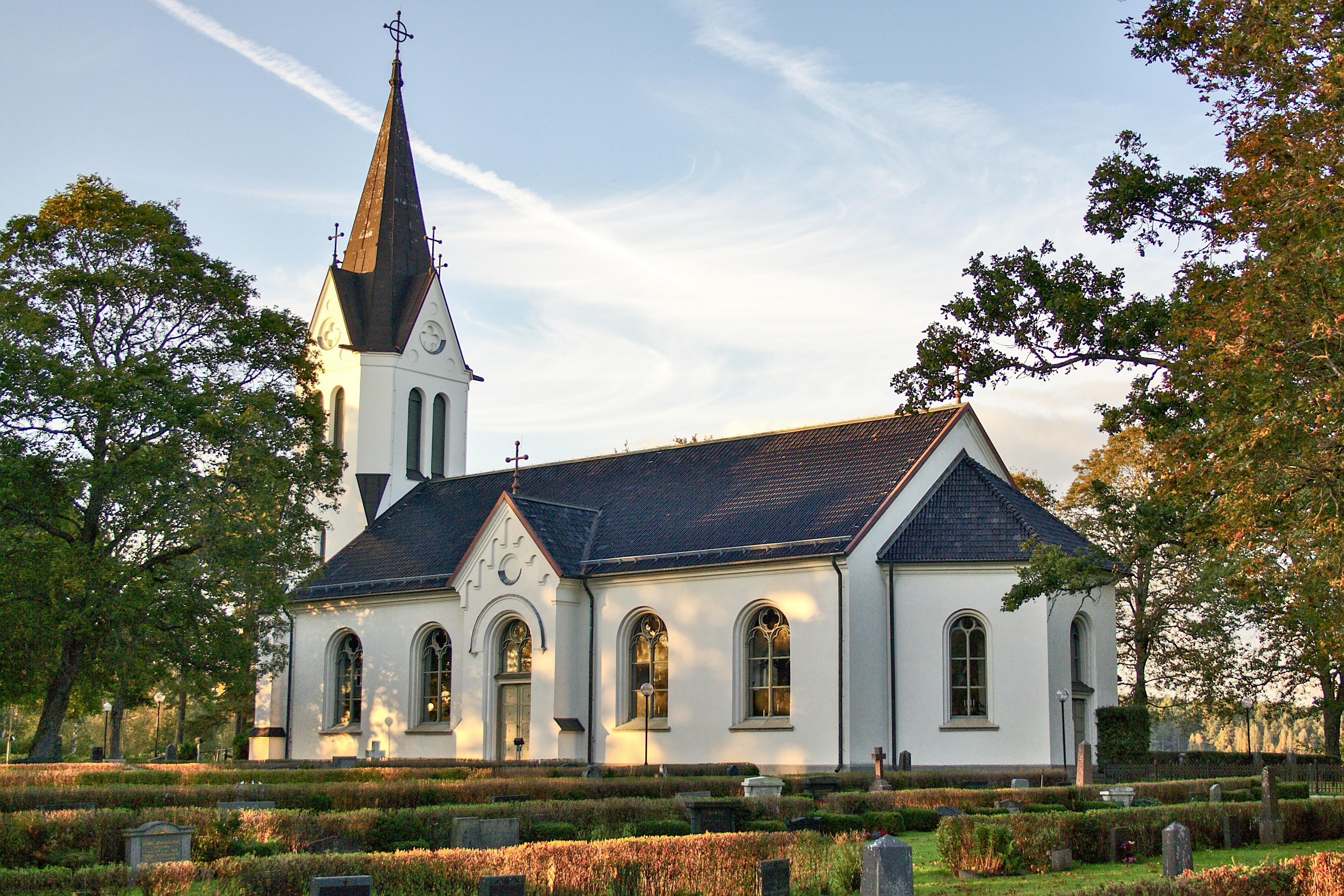 Fågelfors kyrka (Stora Klobo 1:224)